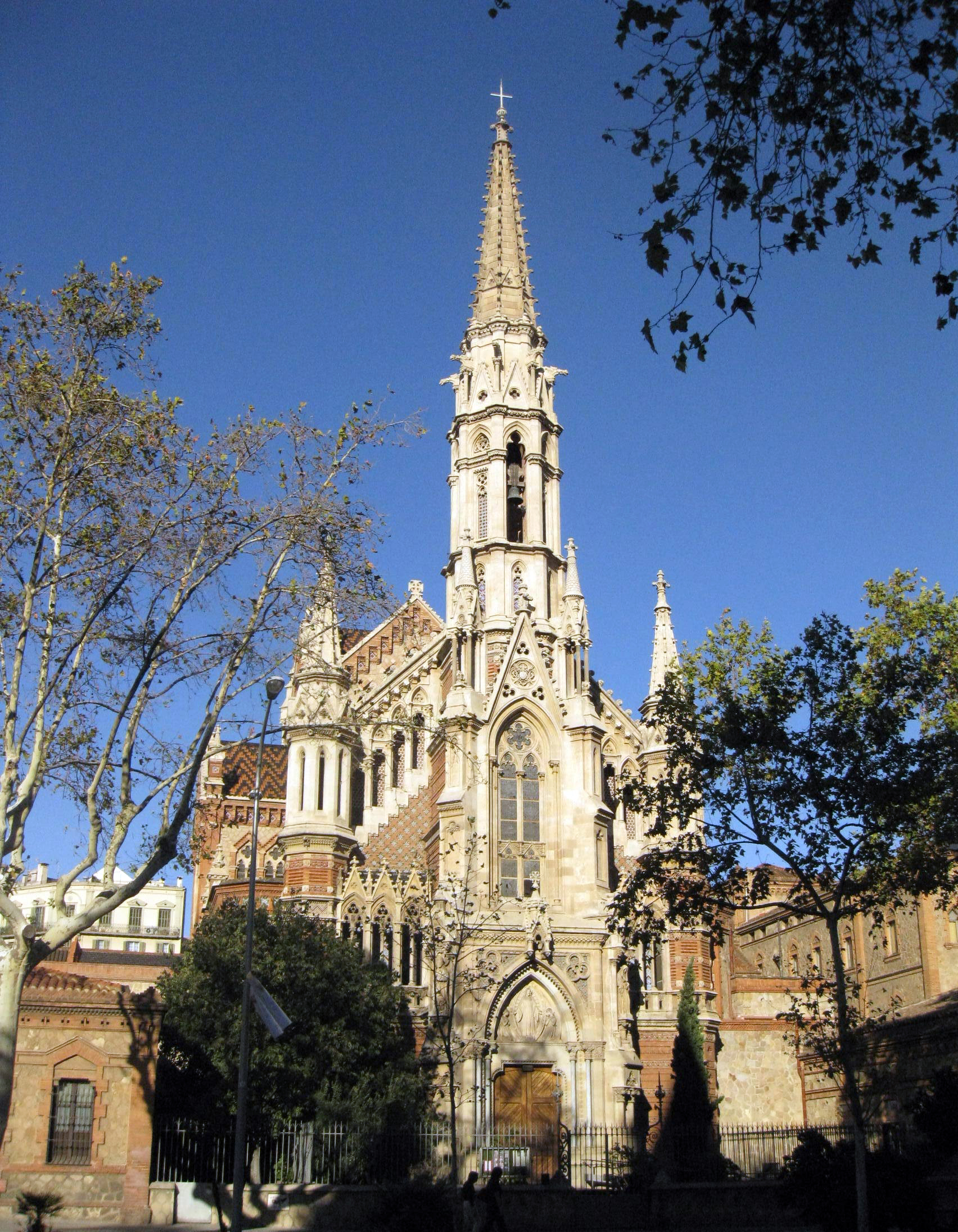 Església i Convent de les Saleses (Barcelona)